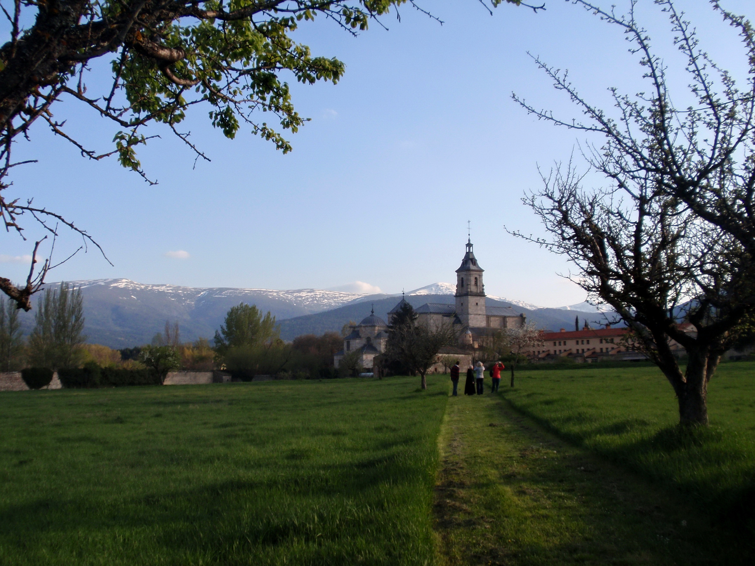 Monasterio de Santa María de El Paular. Panorámica desde el huerto.